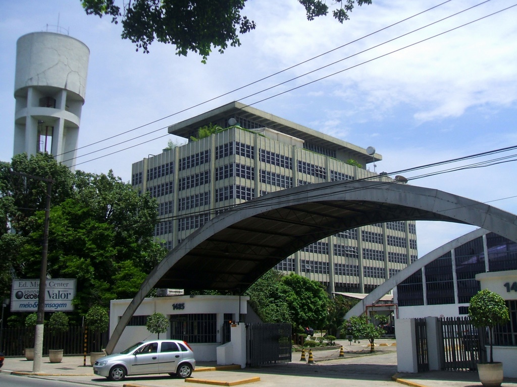 Edifício Mídia Center, na Avenida Jaguaré, distrito homônimo da cidade de São Paulo, Brasil. Sede da Editora Globo e de seu parque gráfico, do jornal Valor Econômico e da agência Meio & Mensagem.